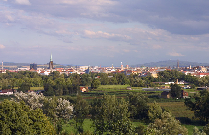 Pohled na město Plzeň od ZOO.